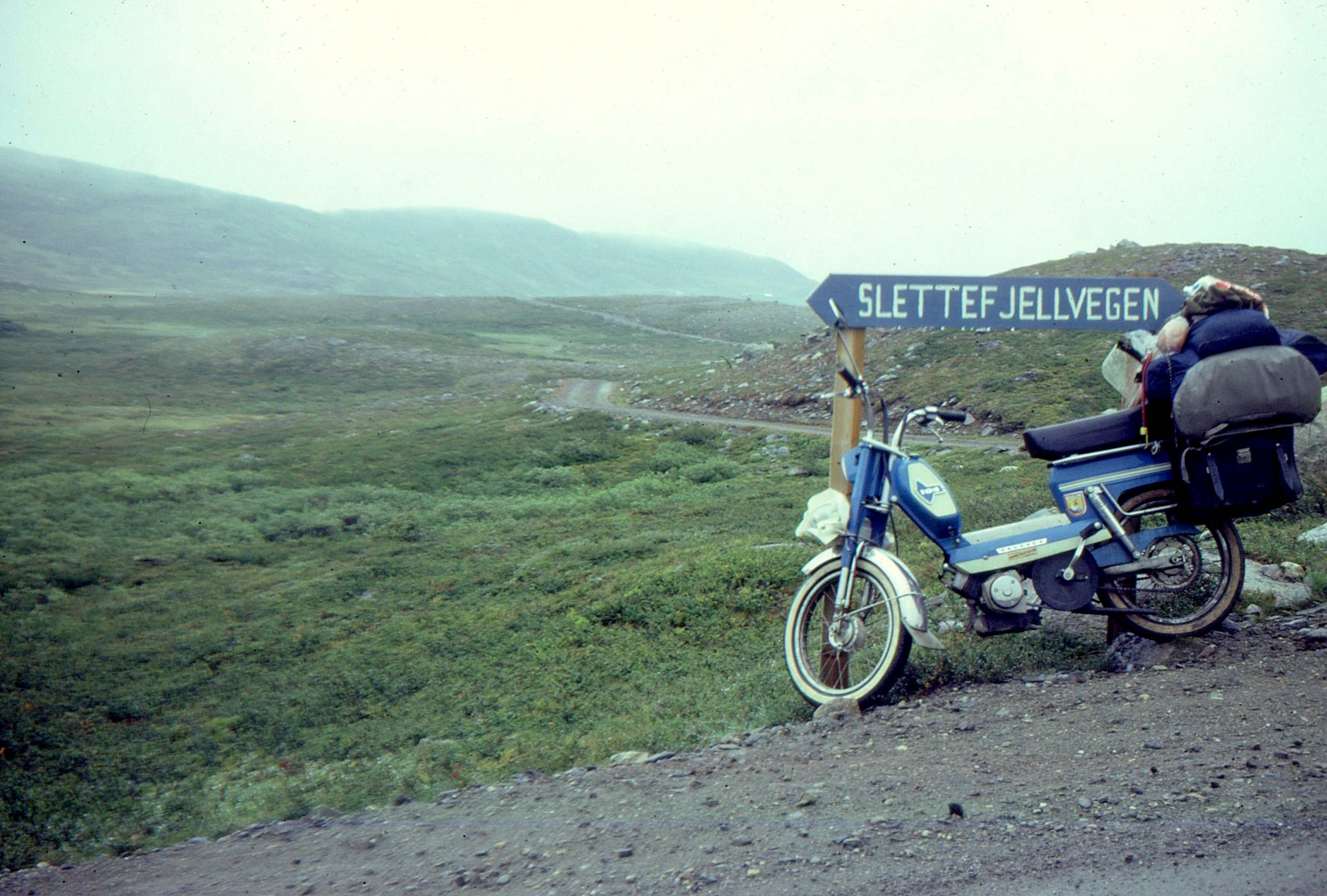 Cyclomoteur français Peugeot 104 (49.9cc) sur le Slettefjellvegen (Norvège), 1977.